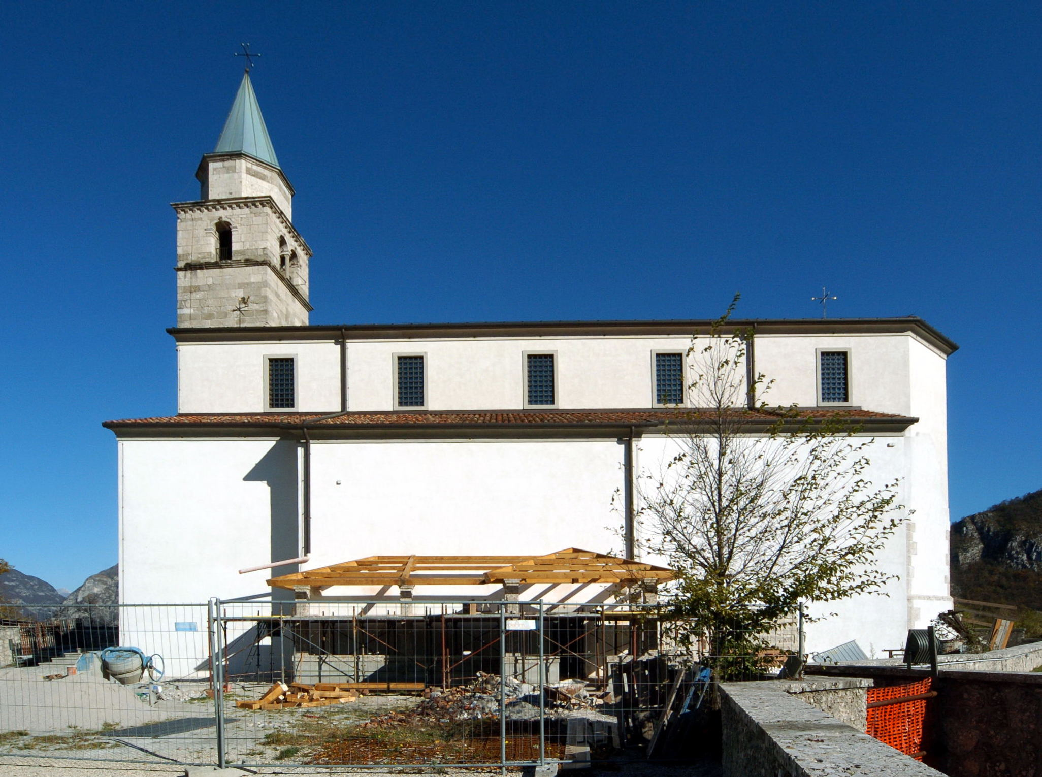 Parish church (Pieve di Santo Stefano) at Cesclans in the community Cavazzo Càrninco, province of Udine, region Friuli Venezia-Giulia, Italy